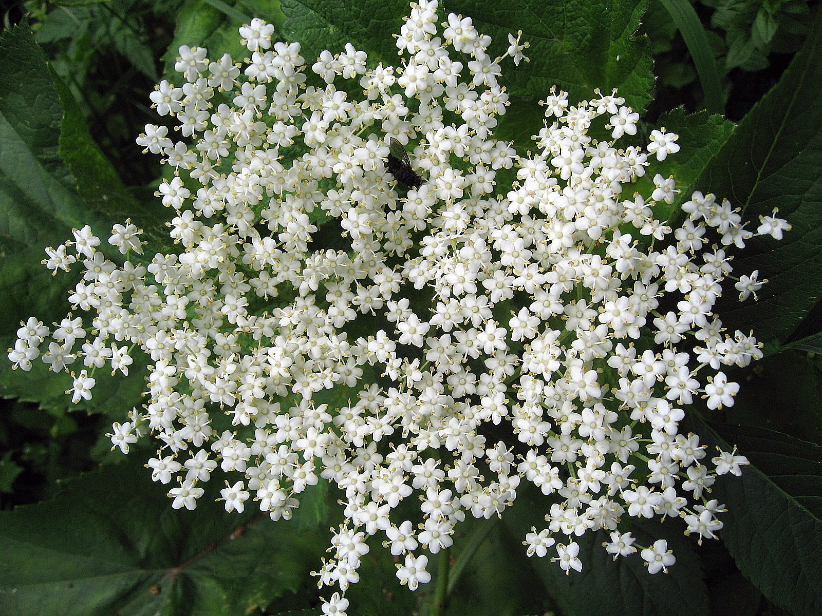 Schwarzer Holunder (Sambucus nigra)